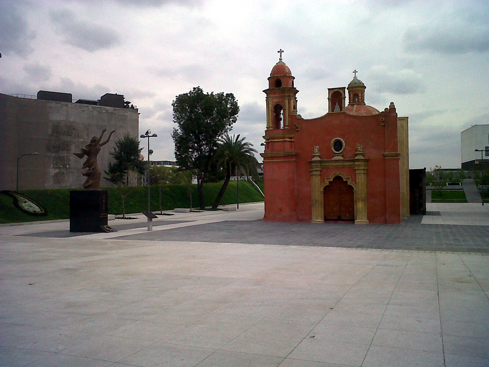 Se dice que esta capilla fue la primera en edificarse en la Nueva España. Esta donde la Avenida 20 de Noviembre deja de ser diagonal y pasa a ser la entrada al Zócalo de México-Tenochtitlan.